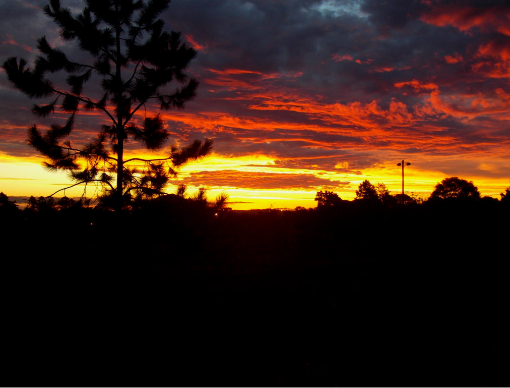 Atardecer en la plazoleta de la localidad de Campo Grande, Provincia de Misiones, Argentina.